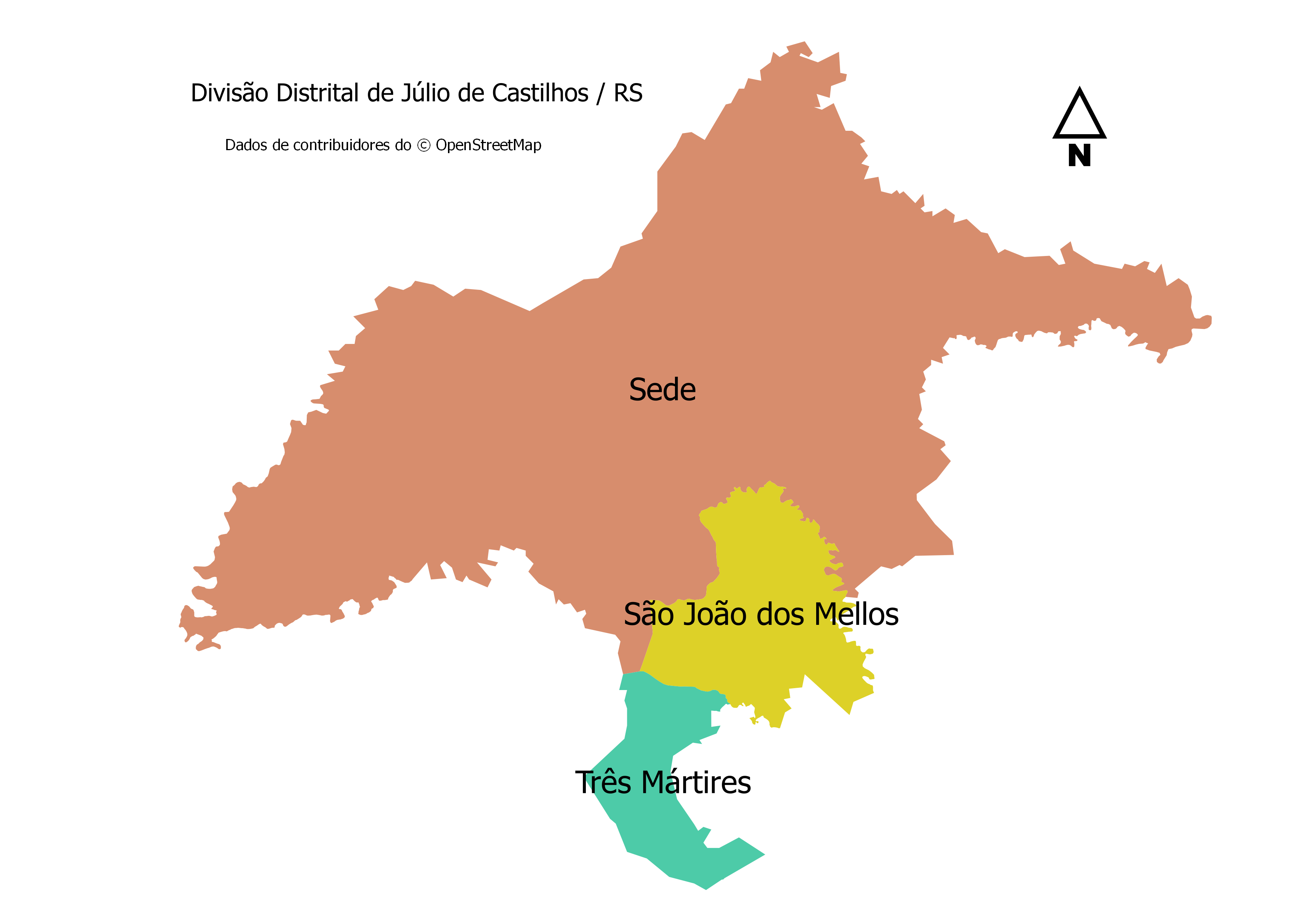 Mapa da divisão em distritos do município de Júlio de Castilhos, RS, Brasil. Dados provenientes do OpenStreetMap sob licença OdbL. Construído com QGis